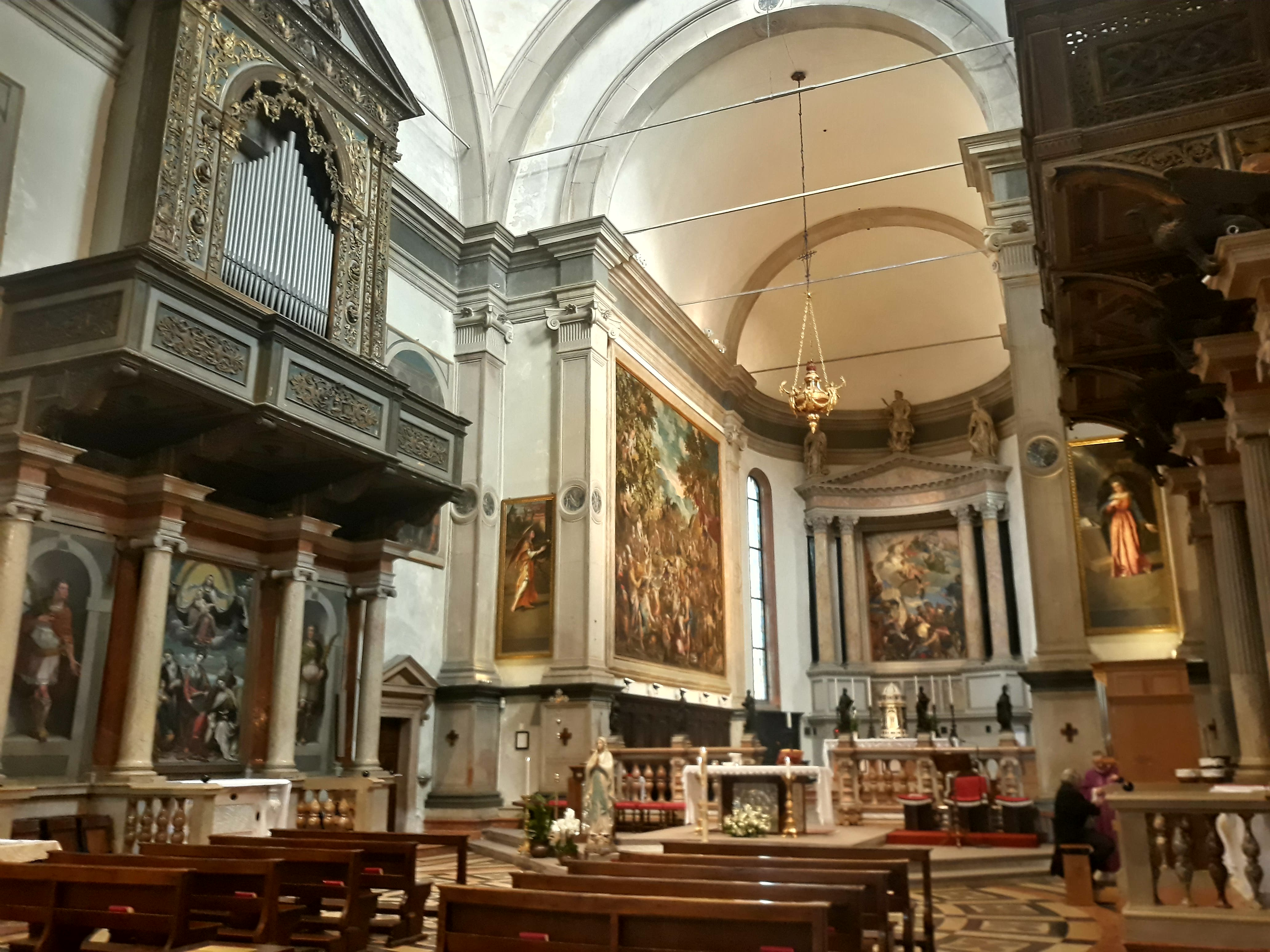 Presbiterio della chiesa di San Giorgio in Braida a Verona